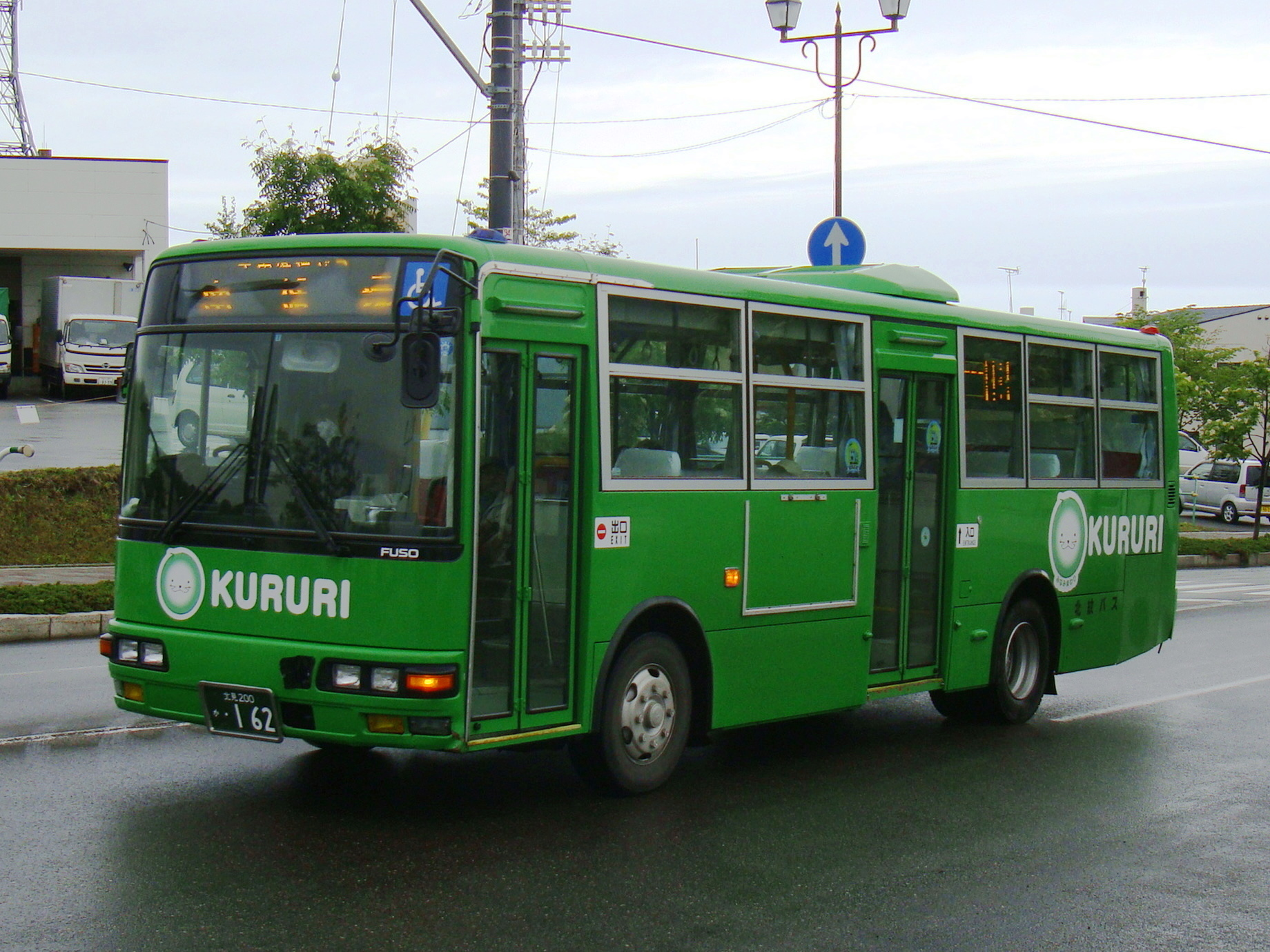 Monbetsu loop line